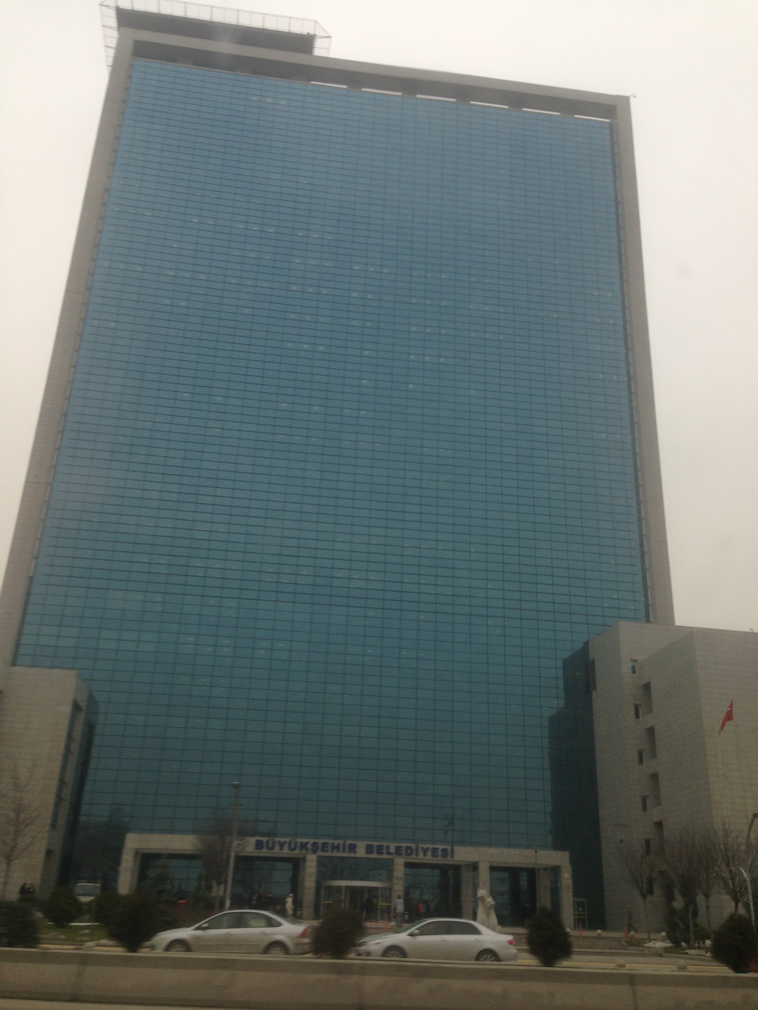 Ankara'dan çeşitli görüntüler